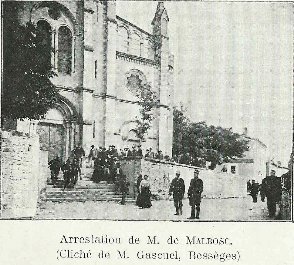 Photo extraite d'une publication de 1903 sur l'expulsion des Oblats de N-D de Bonsecours à Lablachère (Ardèche)